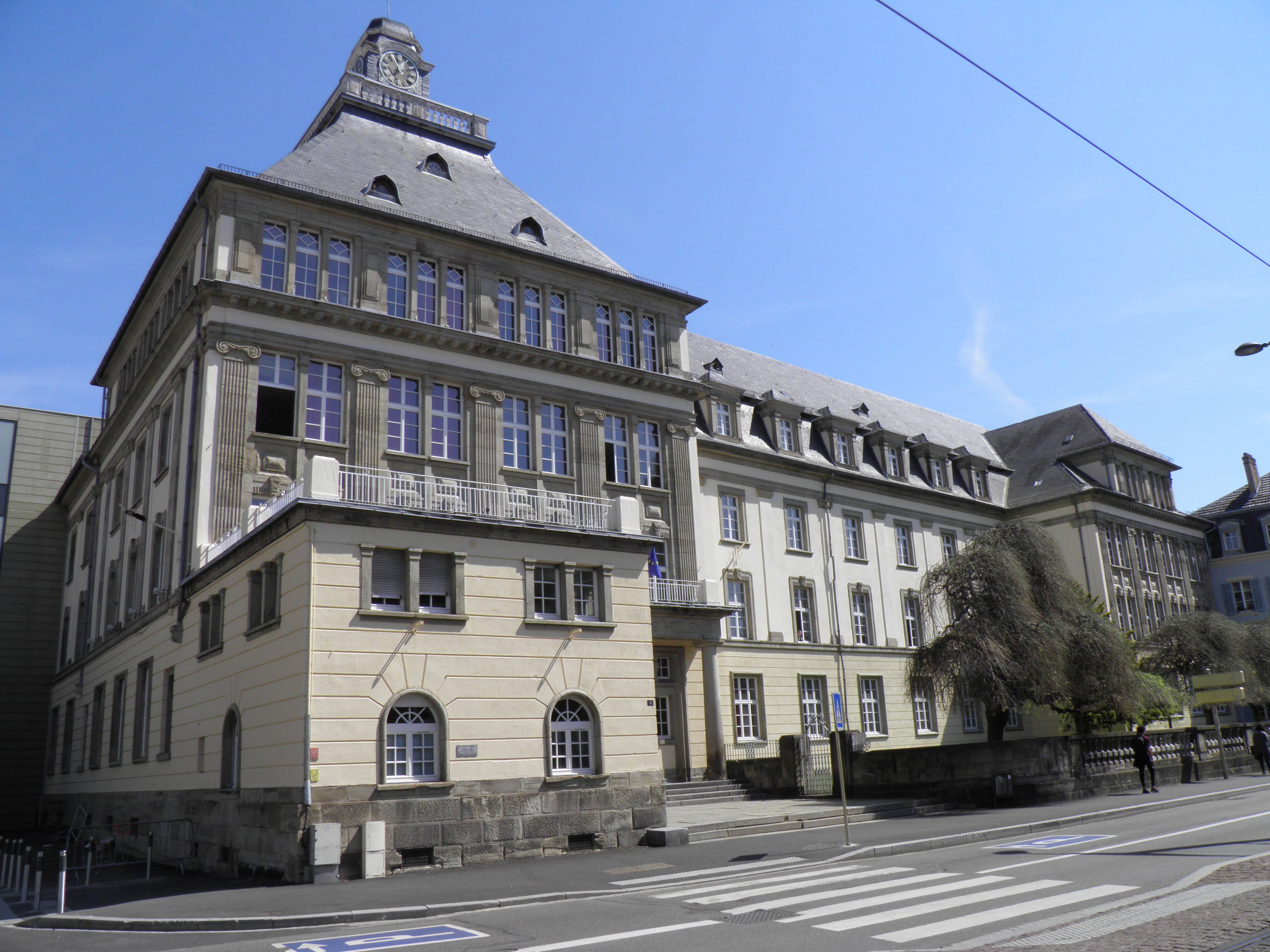 Lycée Michel de Montaigne à Mulhouse (Haut-Rhin, France).